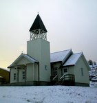 Landegode kirke, Bodø